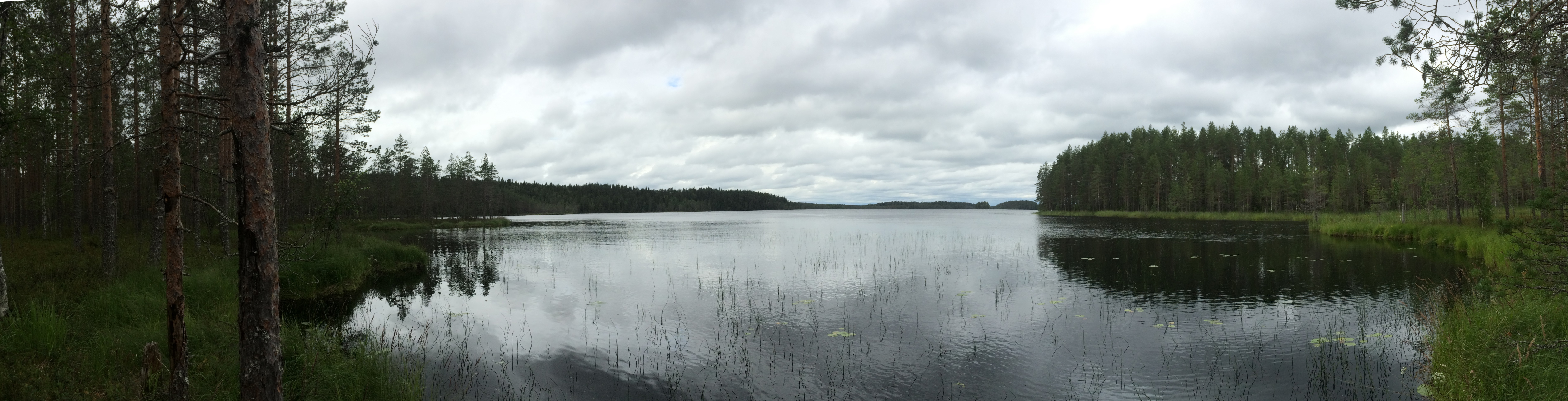 Сонкусъярви